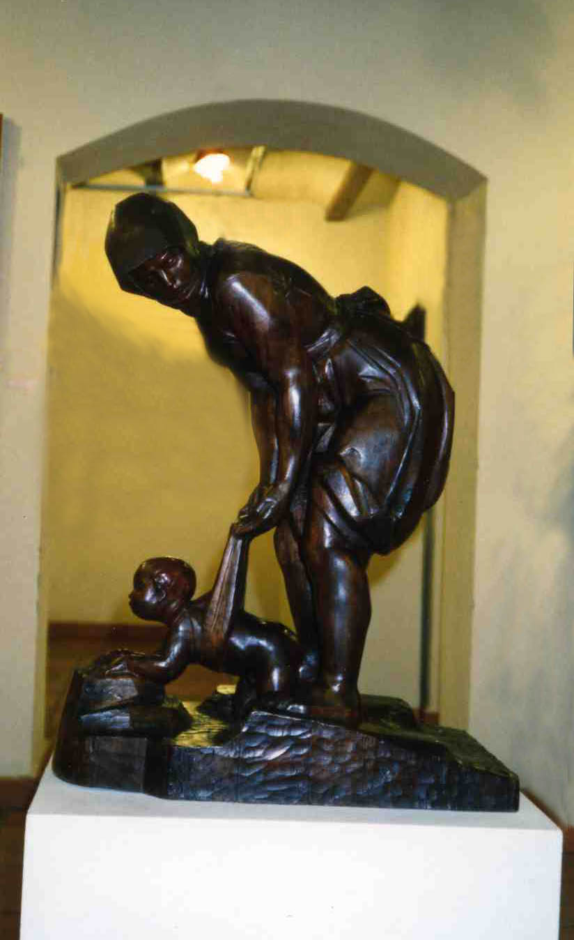 Escultura Maternidad esculpida por Juan Adsuara